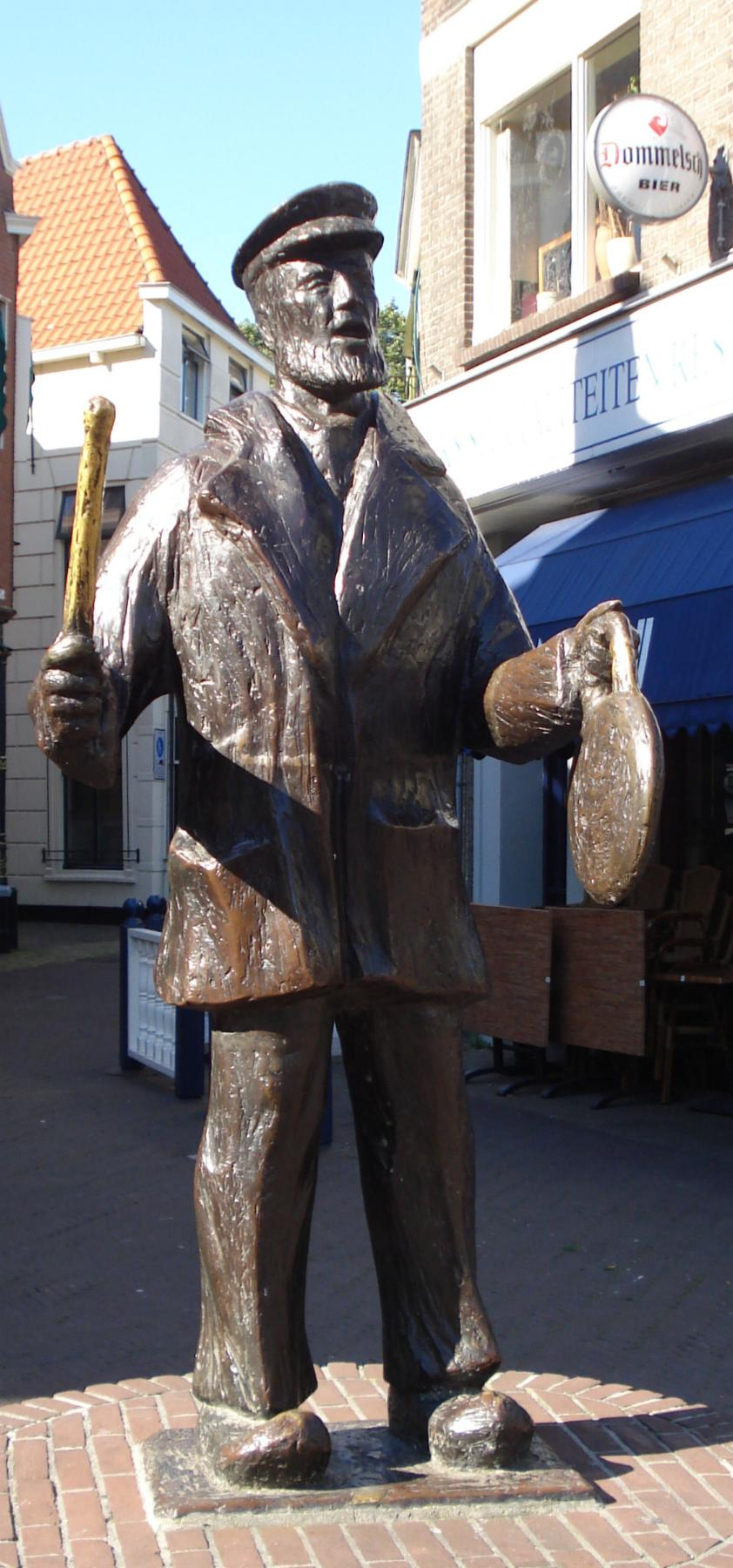 Vlaardingen, Westhavenplaats. Kunstwerk "Stadsomroeper" van Sybille Krosch. 1976. Vlaardingen/The Netherlands.